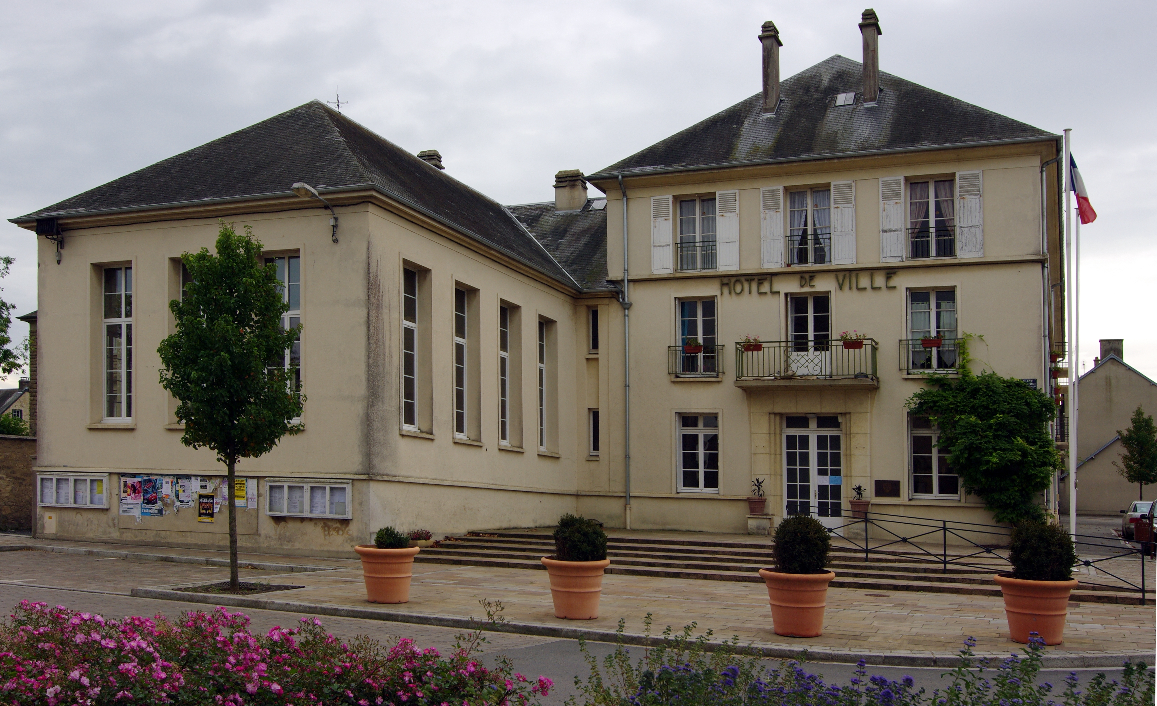 La mairie de Trévières, calvados.